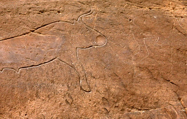 Gravures préhistoriques de la région d'El Bayadh, Algérie